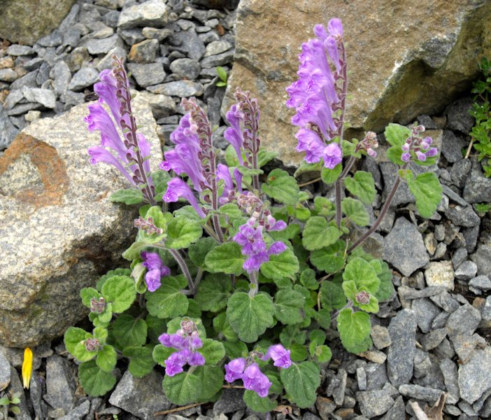 Scutellaria indica var. parviflora